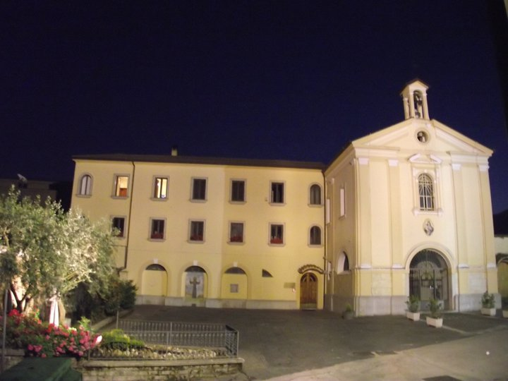 Chiesa e Convento della Madonna delle Grazie di Avellino